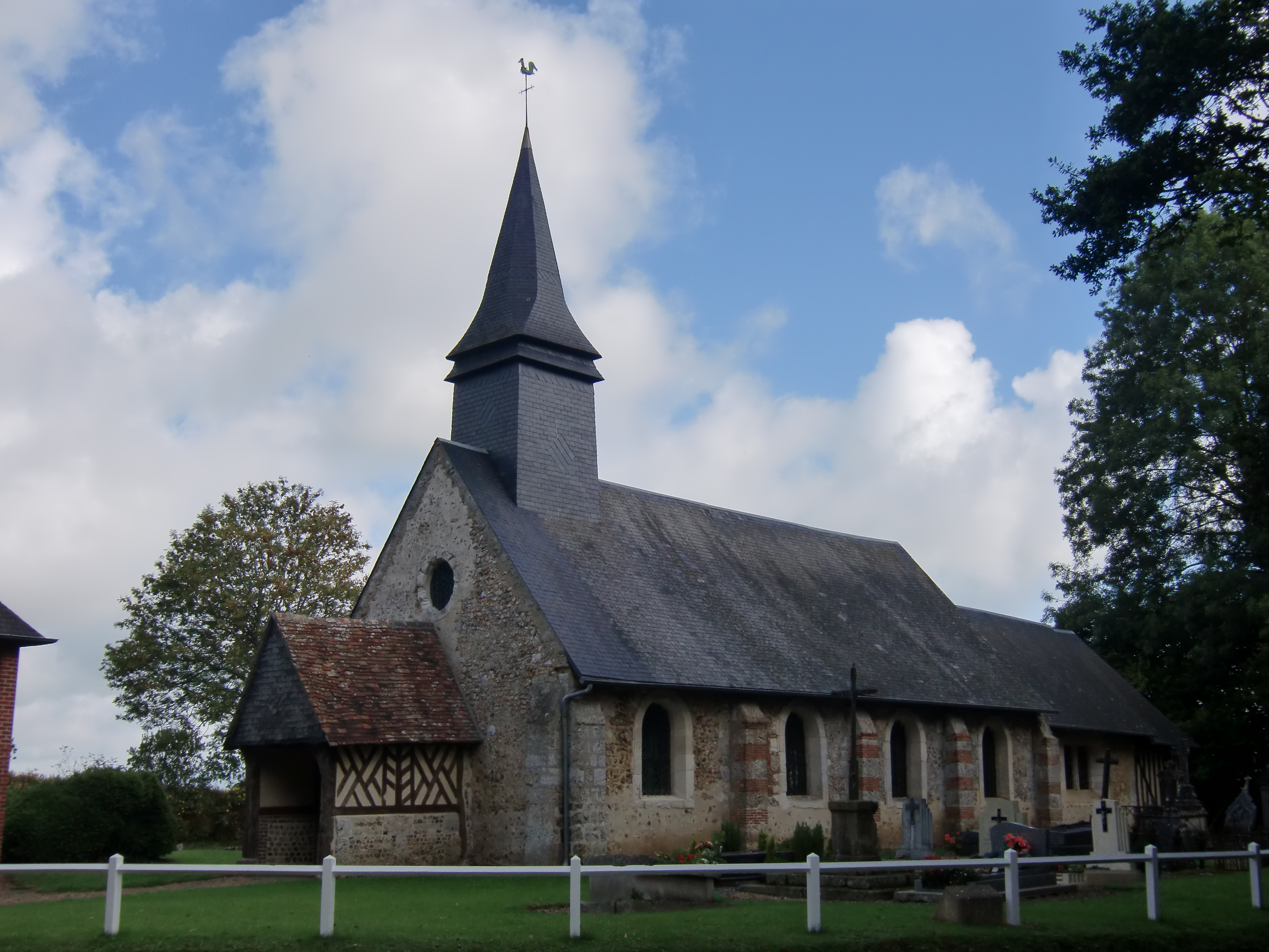 église de Jouveaux à Morainville-Jouveaux (Eure, Normandie, France)